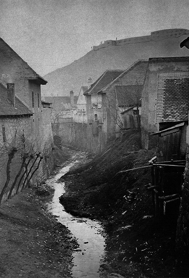 Ördög-árok 1870 körül